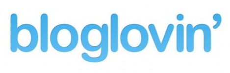 Logo of Bloglovin'